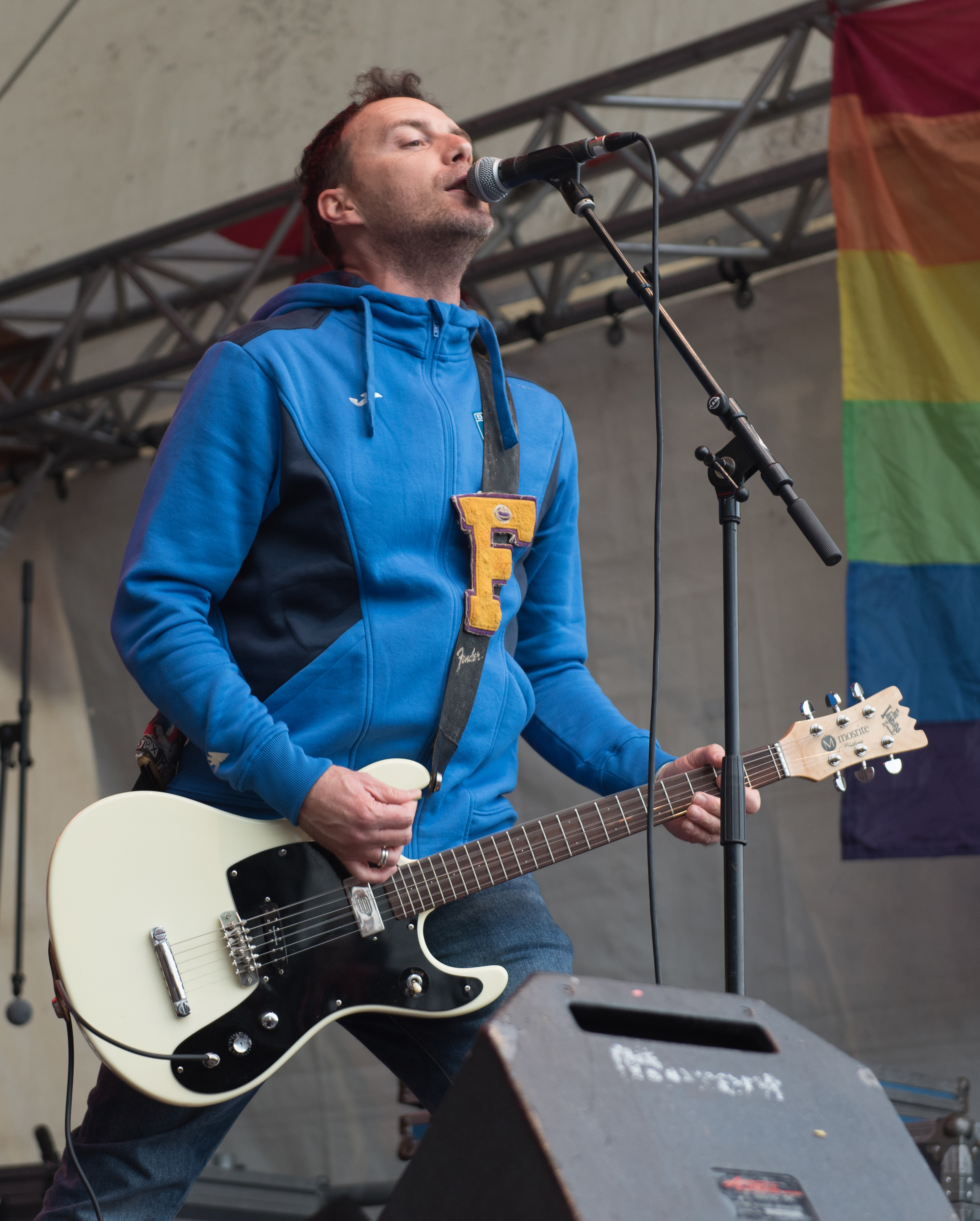 Latte+ beim Hafen Rock 2018